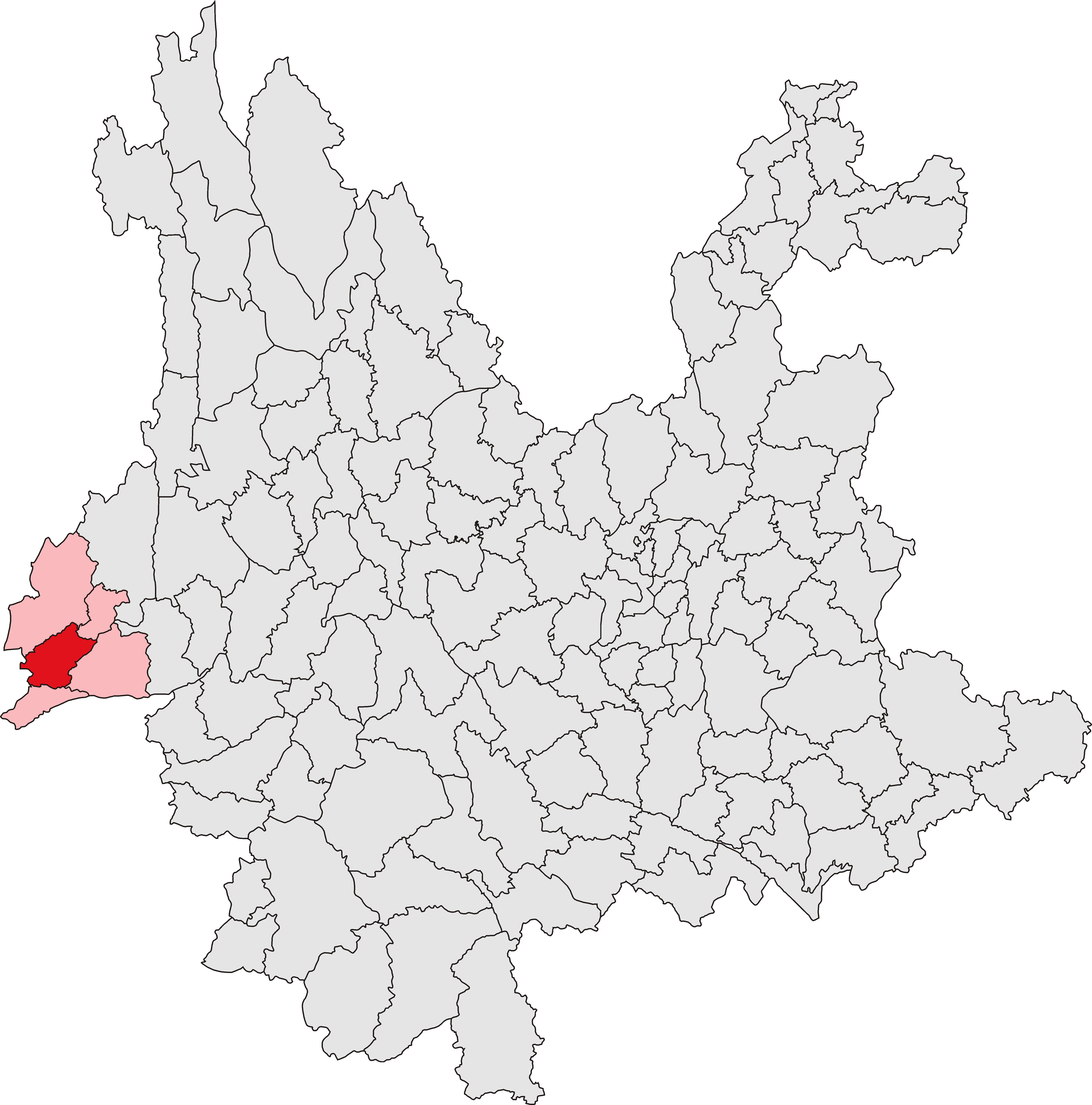 陇川县位置图